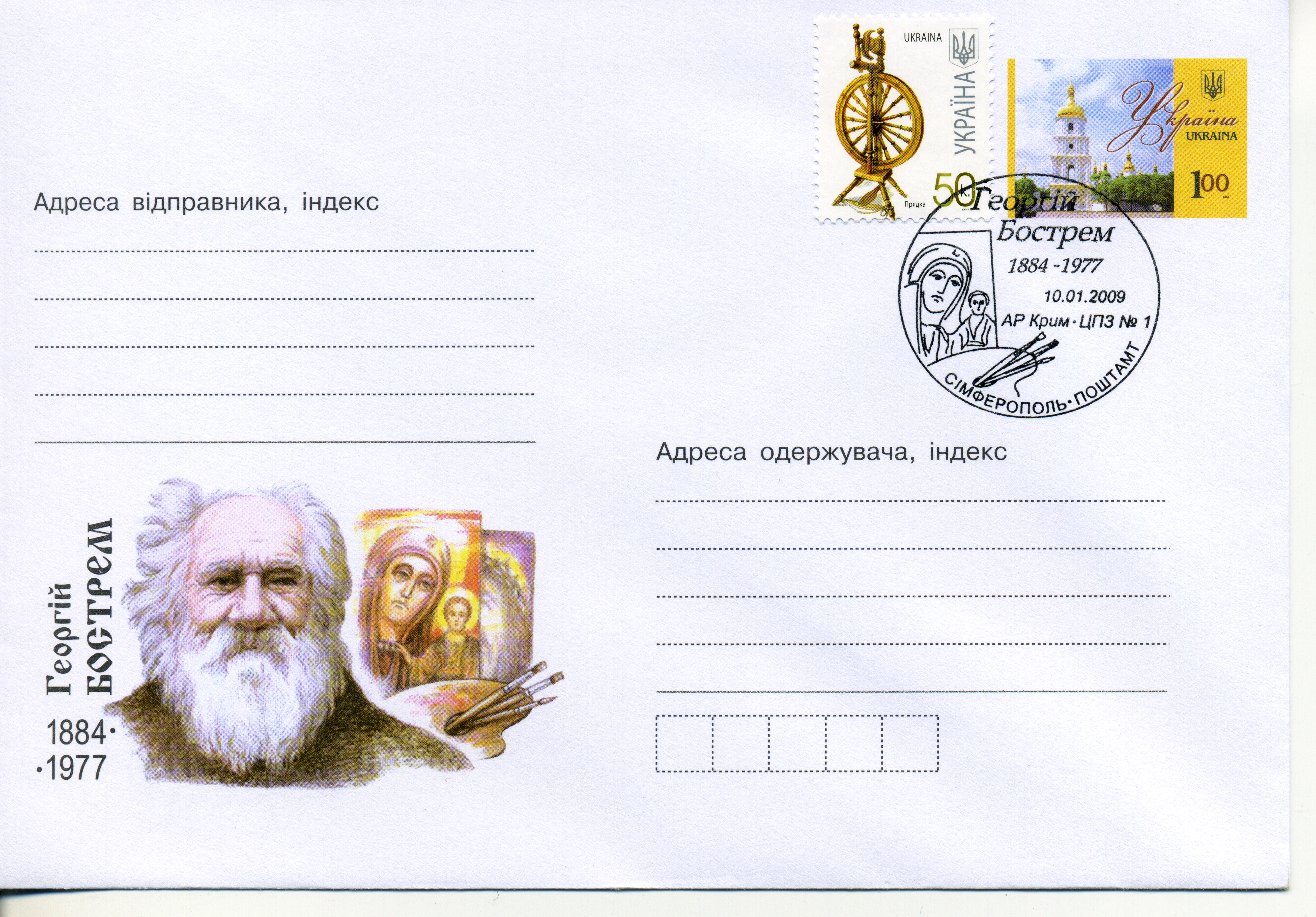 2009. Конверт. Георгий Бострем